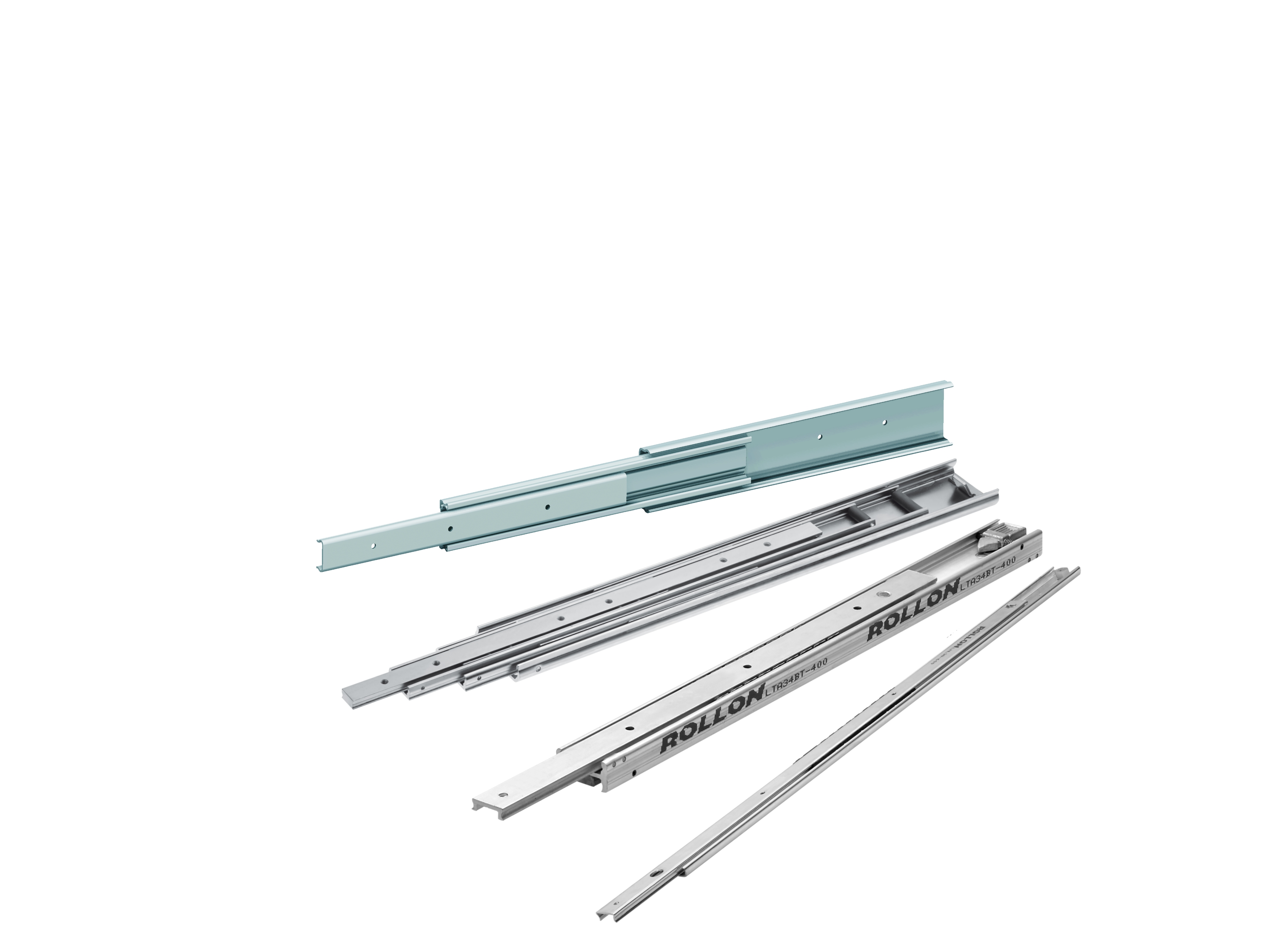 Light Rail